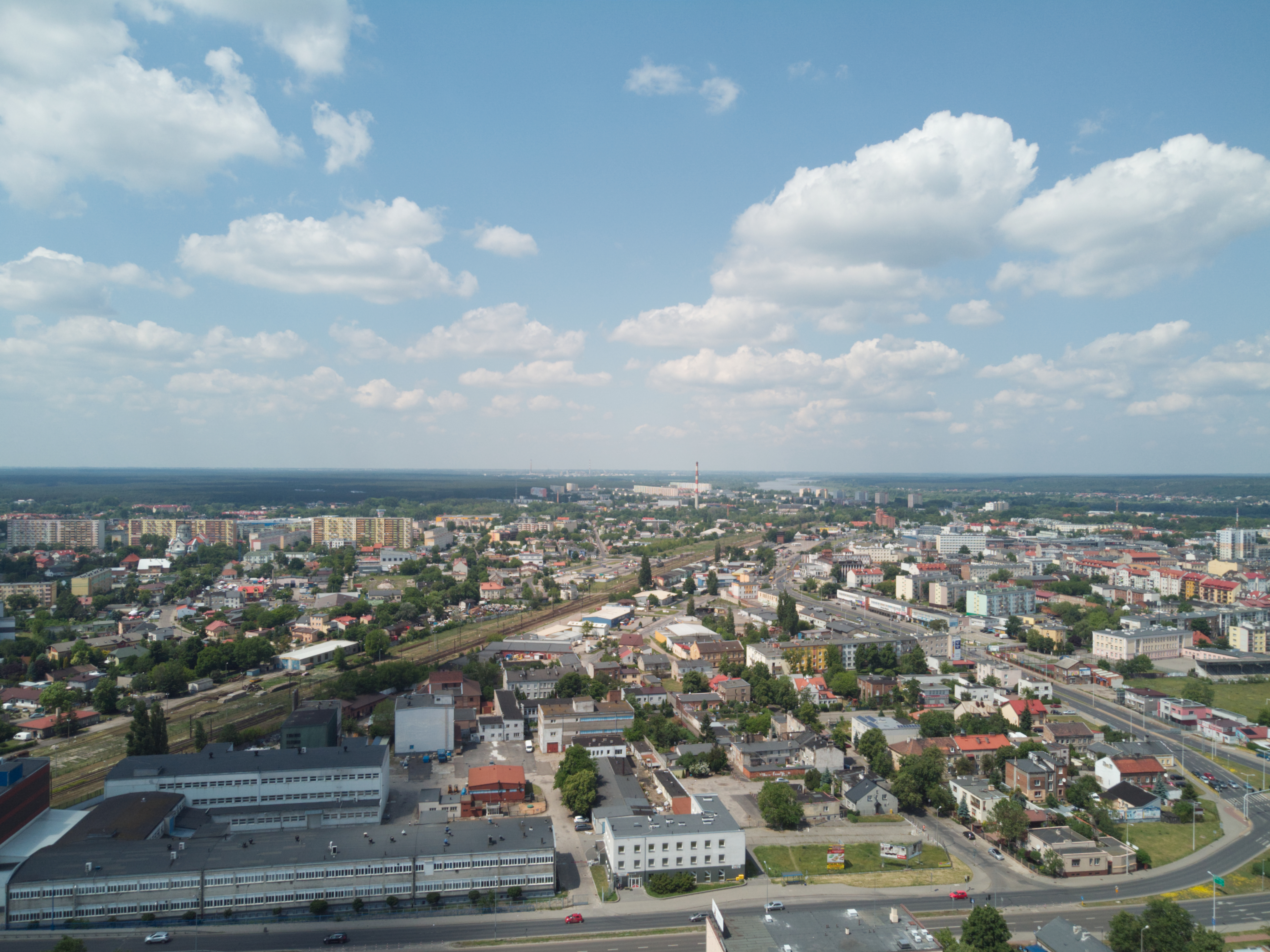 Dzielnica Południe z lotu ptaka (2020 r.)